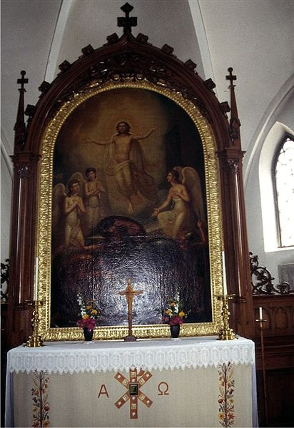 Strövelstorp kyrka i Skåne, Sverige. Altertavle